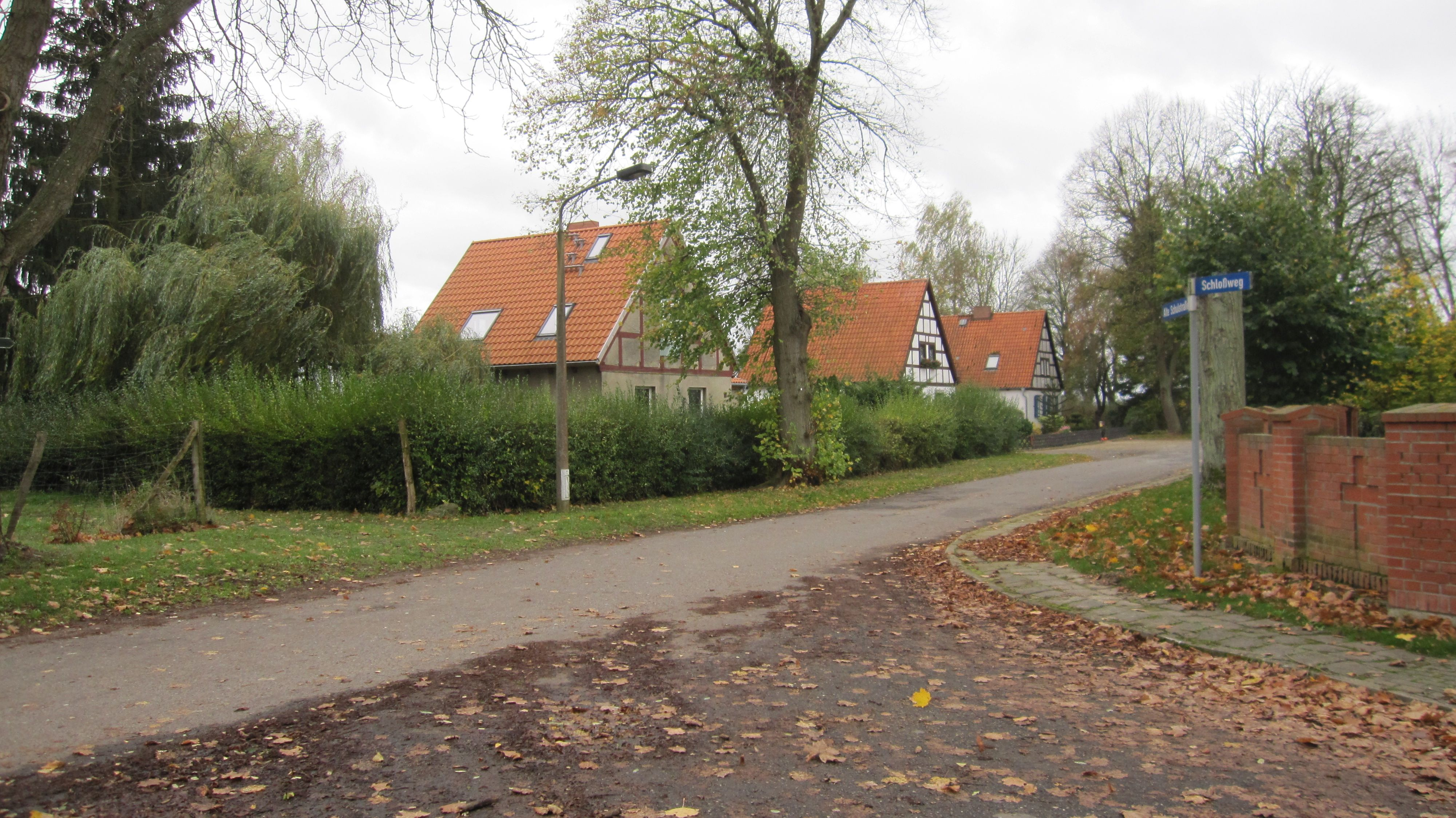 Rittgarten: Denkmalgeschützte "Wohnhausgruppe für Gutsmitarbeiter"